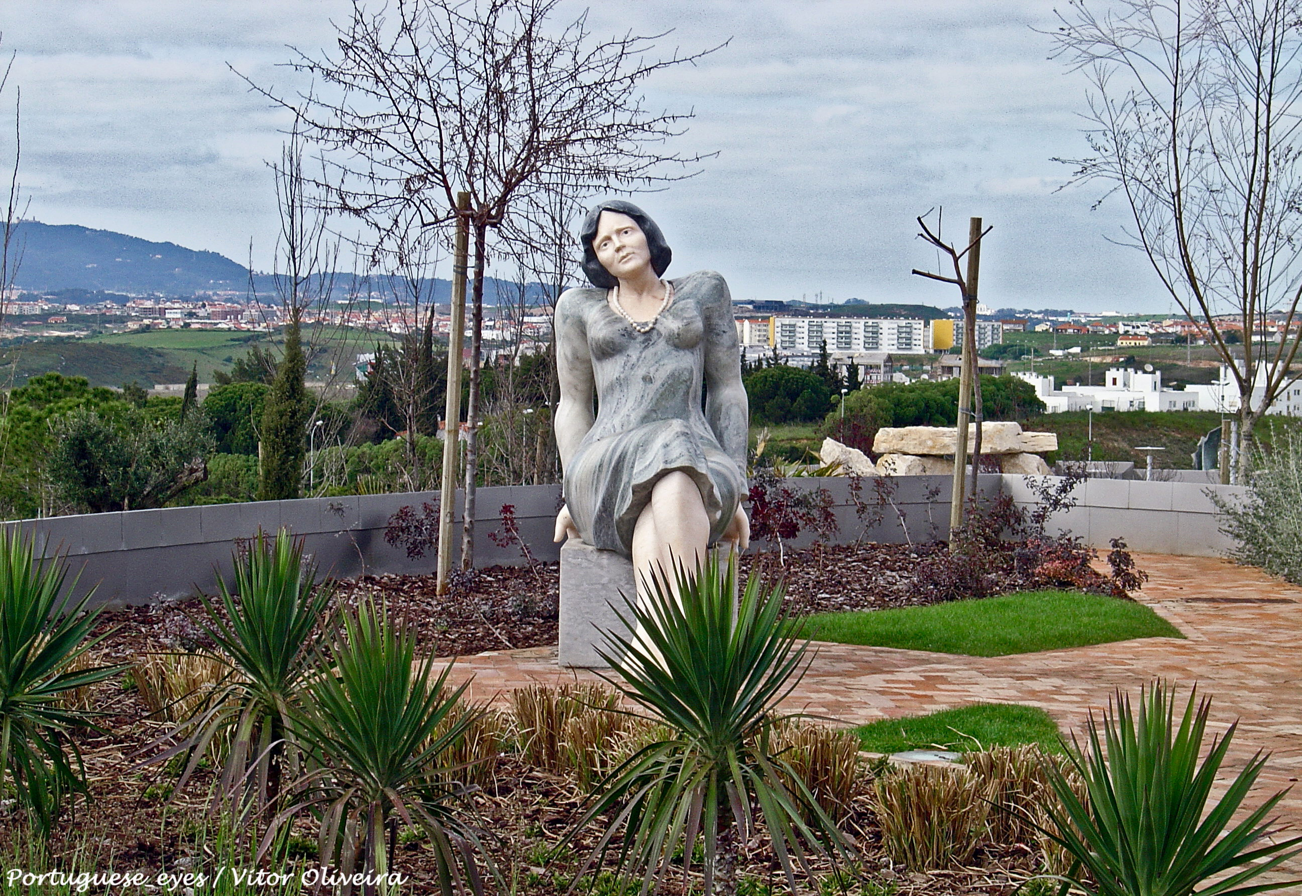 O Parque dos Poetas é um projecto da Câmara Municipal de Oeiras que pretende homenagear a cultura portuguesa. Foi inaugurado em Junho de 2003, proporcionando um espaço de lazer, de cultura e de desporto, procurando cruzar a poesia e a arte dos jardins. Tem jardins, alamedas, parque infantil, fontes, parque de merendas, anfiteatro ao ar livre, entre outras possibilidades a descobrir. Estão representados na primeira fase os seguintes poetas: Carlos de Oliveira, Camilo Pessanha, Teixeira de Pascoaes, Mário de Sá-Carneiro, Florbela Espanca, José Gomes Ferreira, José Régio, Vitorino Nemésio, Miguel Torga, Jorge de Sena, Sophia de Mello Breyner Andresen, Natália Correia, Eugénio de Andrade, Manuel Alegre, Fernando Pessoa, Alexandre O'Neill, António Ramos Rosa, David Mourão-Ferreira, António Gedeão e Ruy Belo.